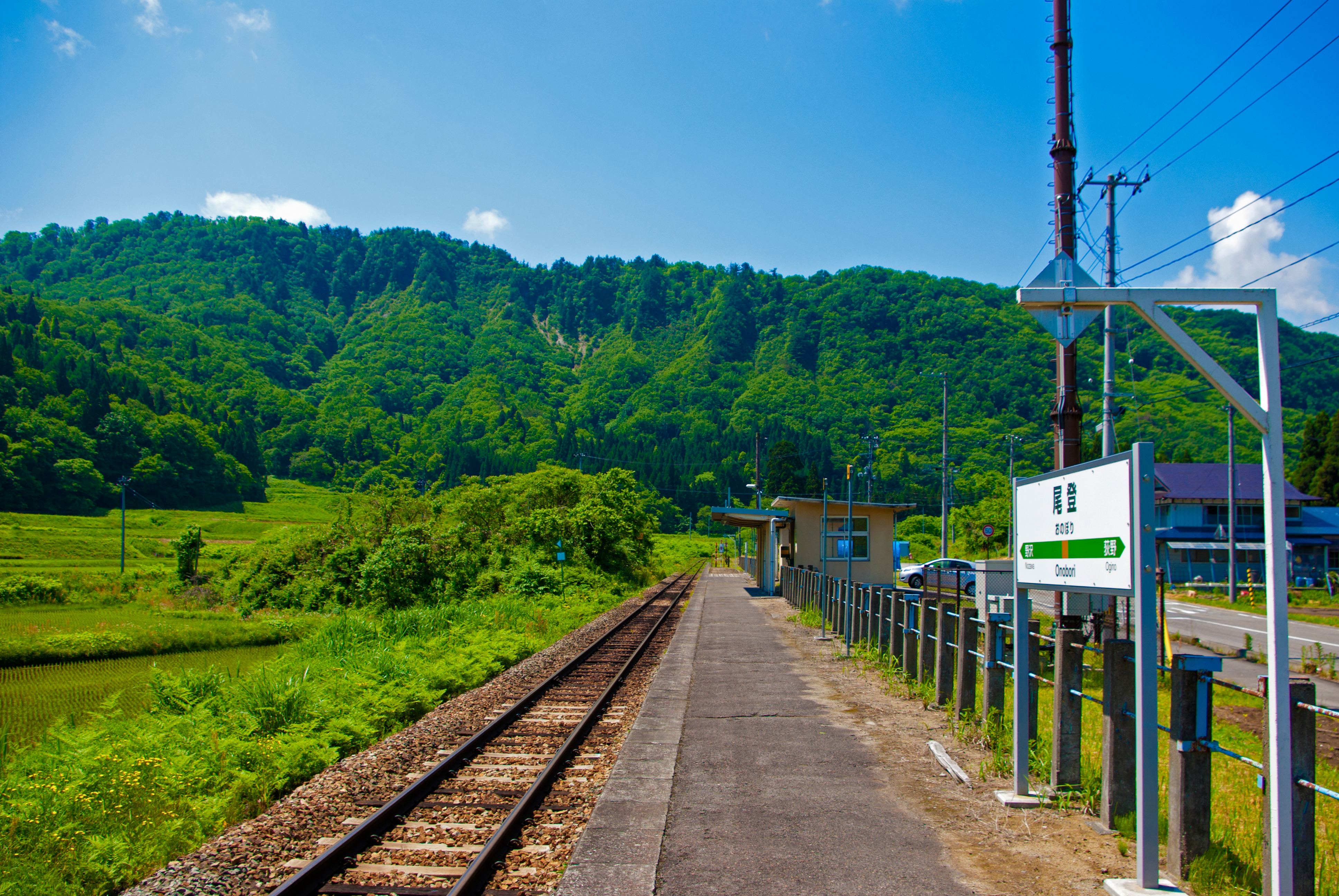 東日本旅客鉄道磐越西線尾登駅